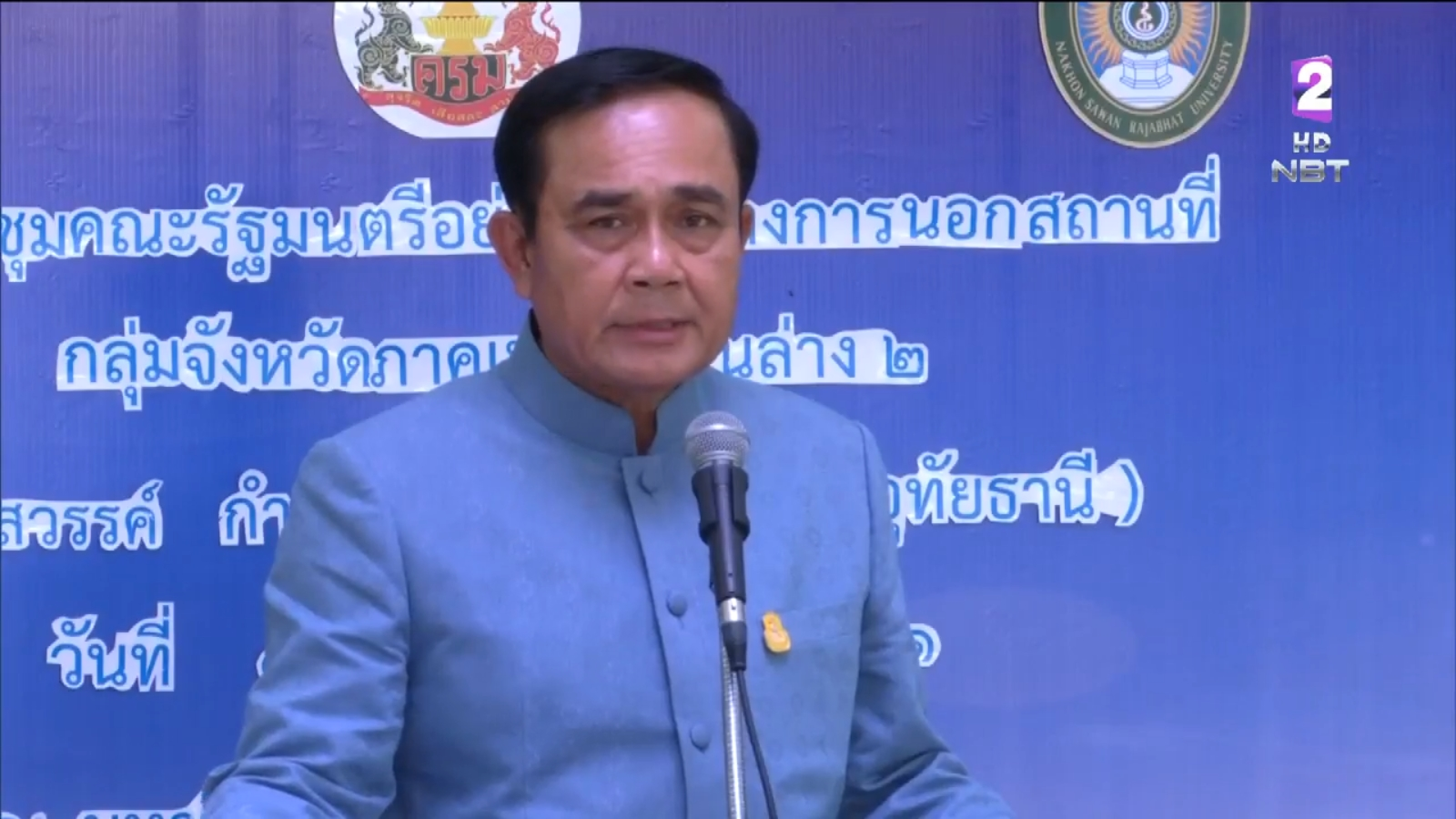 ไทยยินดี 2 ผู้นำสหรัฐฯ-เกาหลีเหนือ ลงนามข้อตกลงปลดอาวุธนิวเคลียร์ ส่งผลดีภูมิภาคเอเชียและทั่วโลก